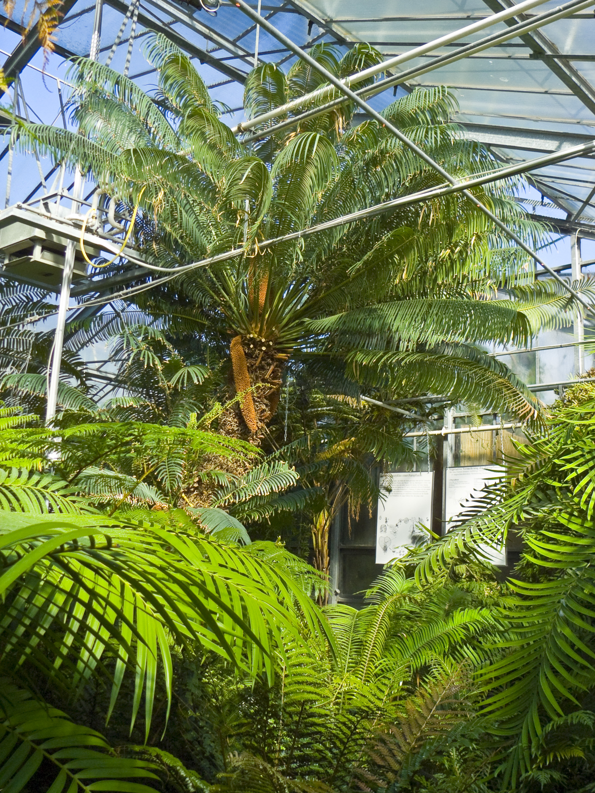 Neuer Botanischer Garten Marburg, Schaugewächshäuser, Farnhaus mit Farmen der Tropen.